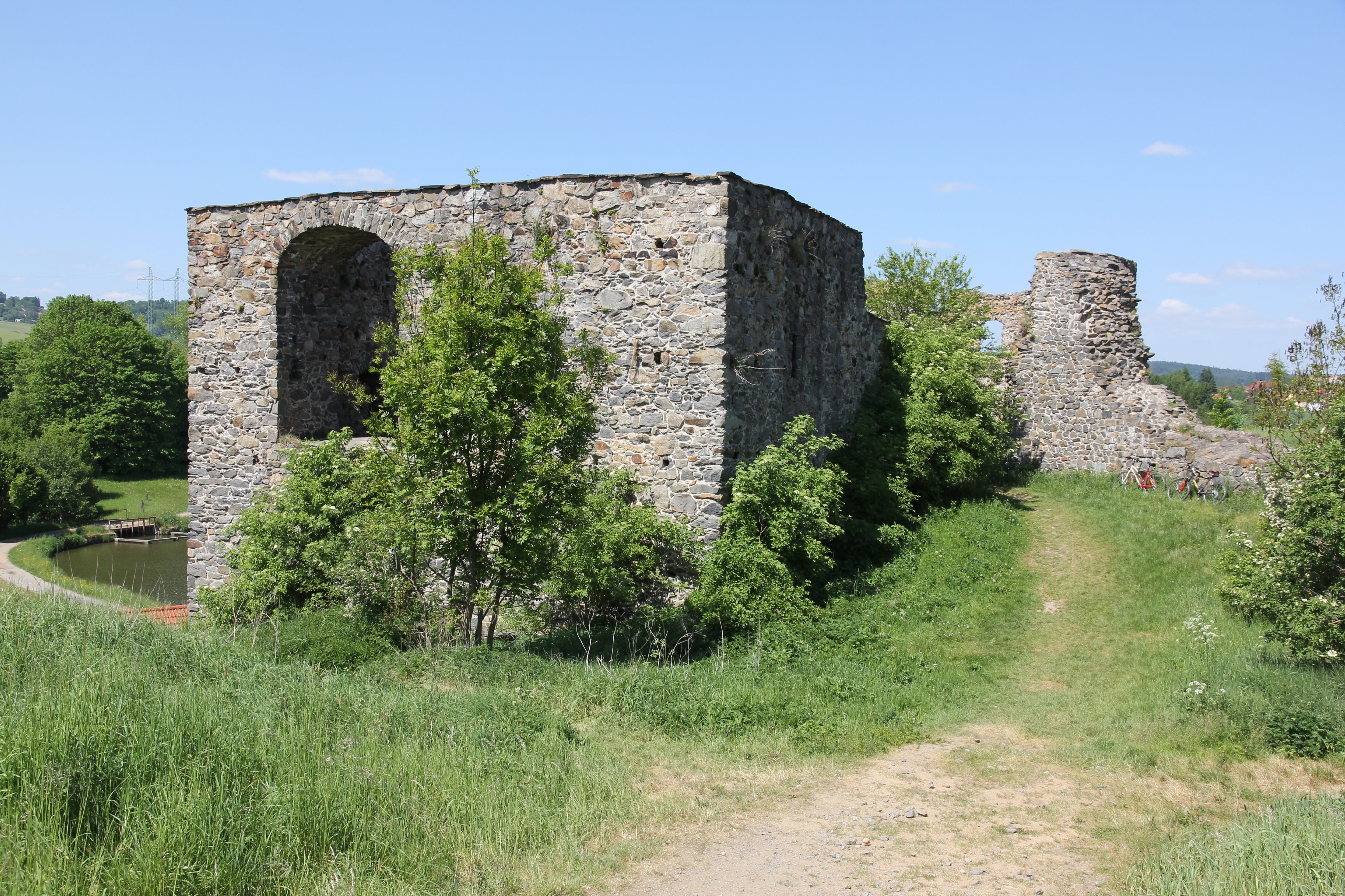 Hrad Borotín, zřícenina a archeologické stopy (Borotín), JV od vsi, Borotín